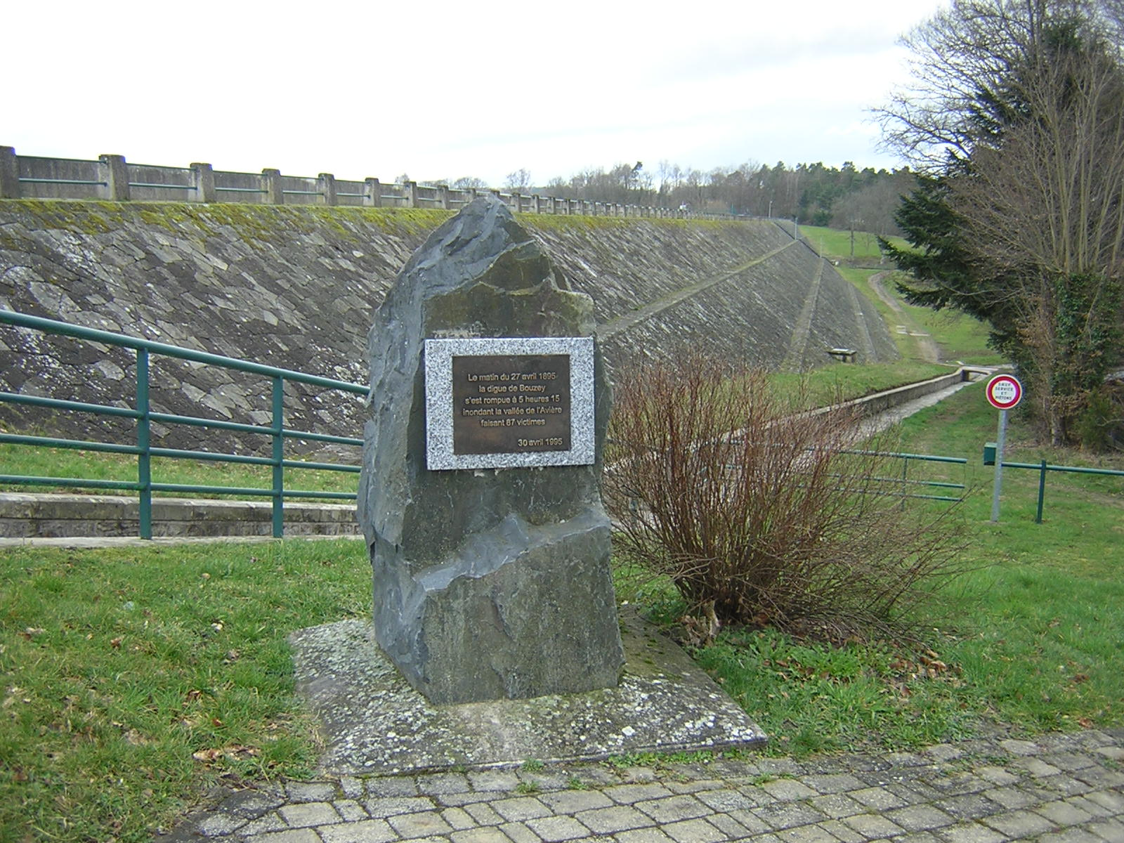 Barrage de Bouzey - monument commémoratif